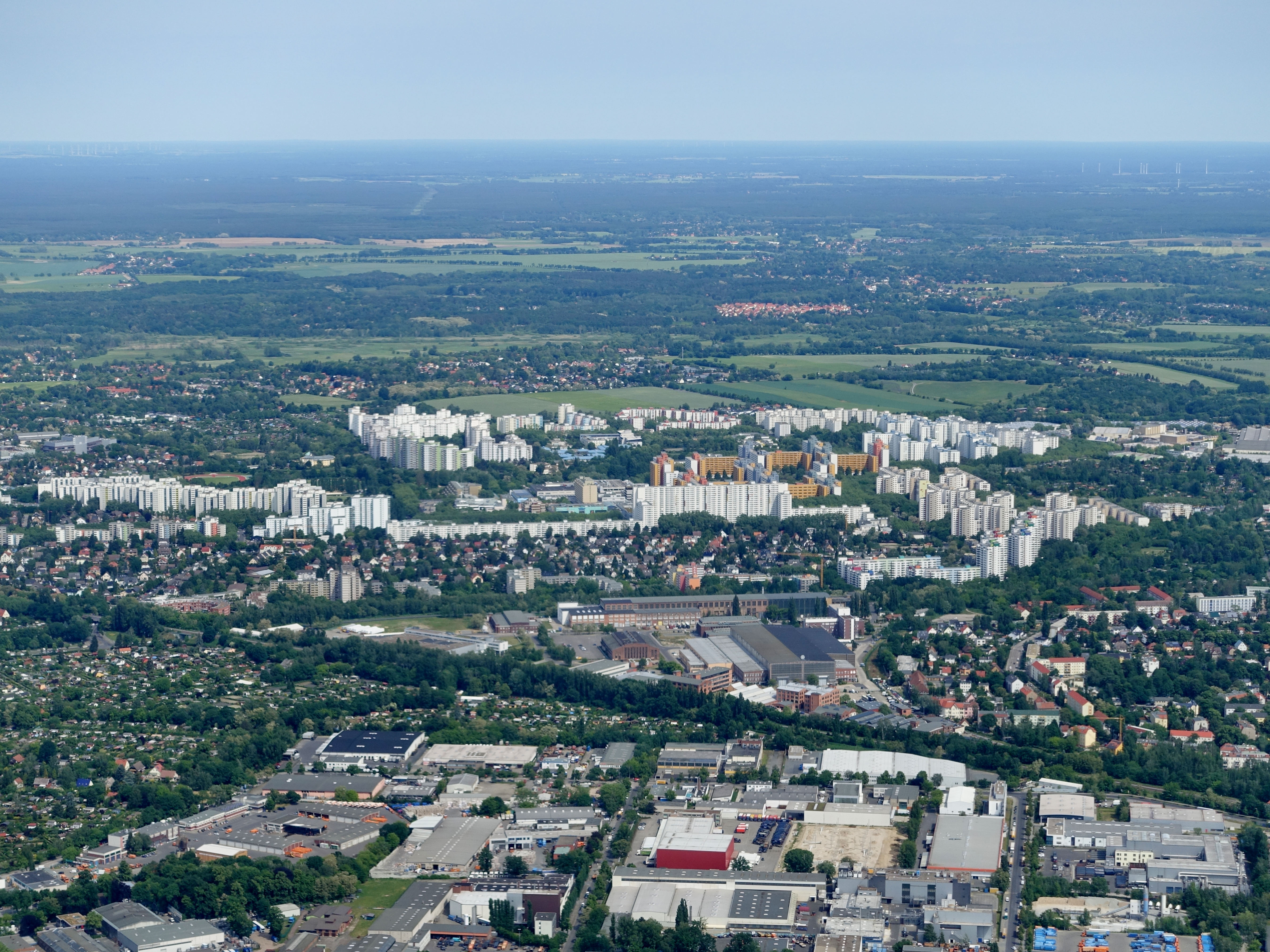 Märkisches Viertel, Berlin, Deutschland